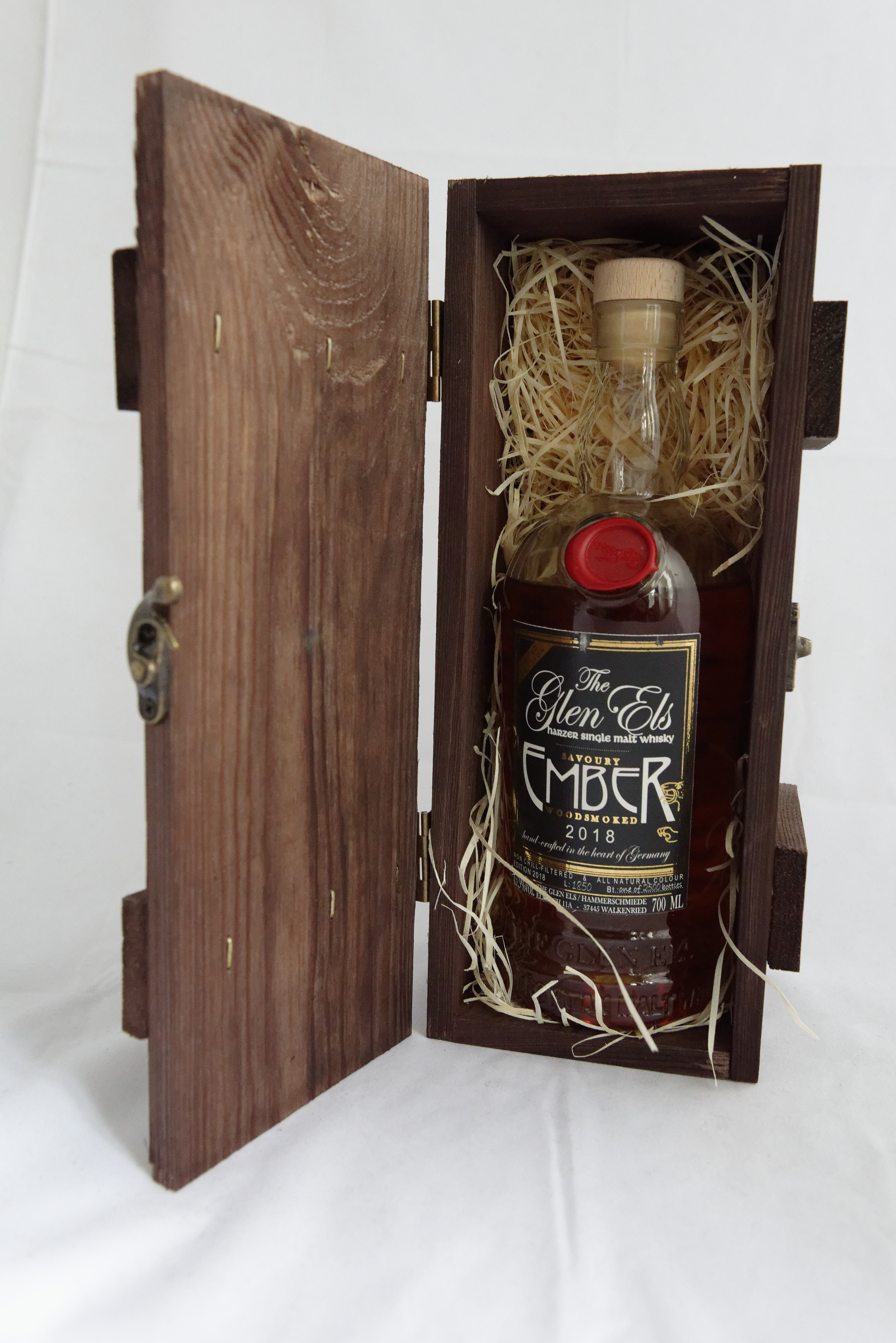 Glen Els Ember, 45,9 Vol., 2.500 bottles